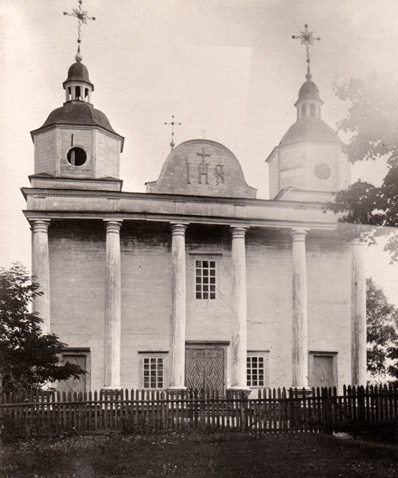 Kościół rzymsko-katolicki w Czarnobylu zbudowany w XVIII wieku. Zburzony w czasach ZSRR.